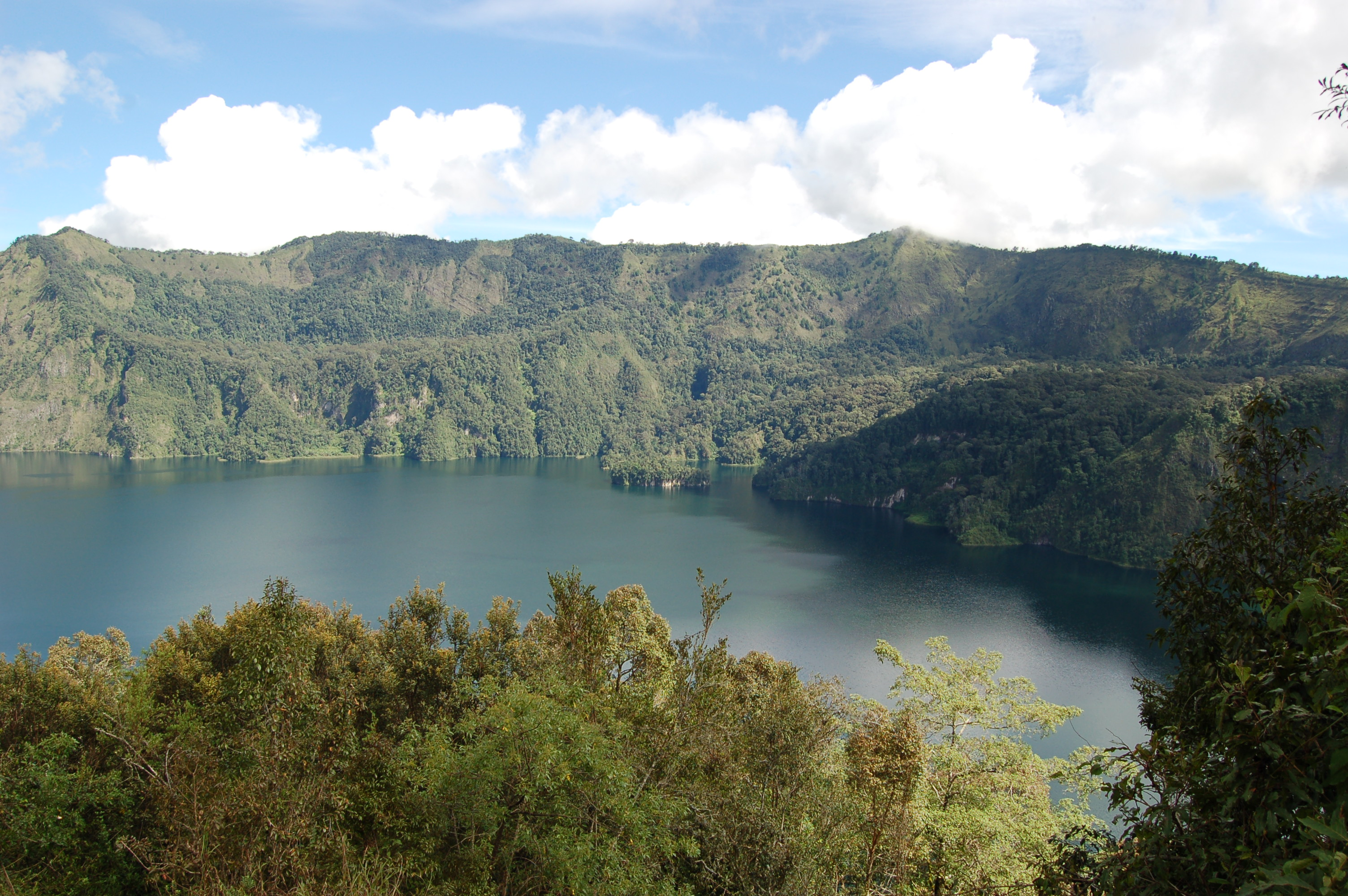 Lake Ngozi, Tanzania